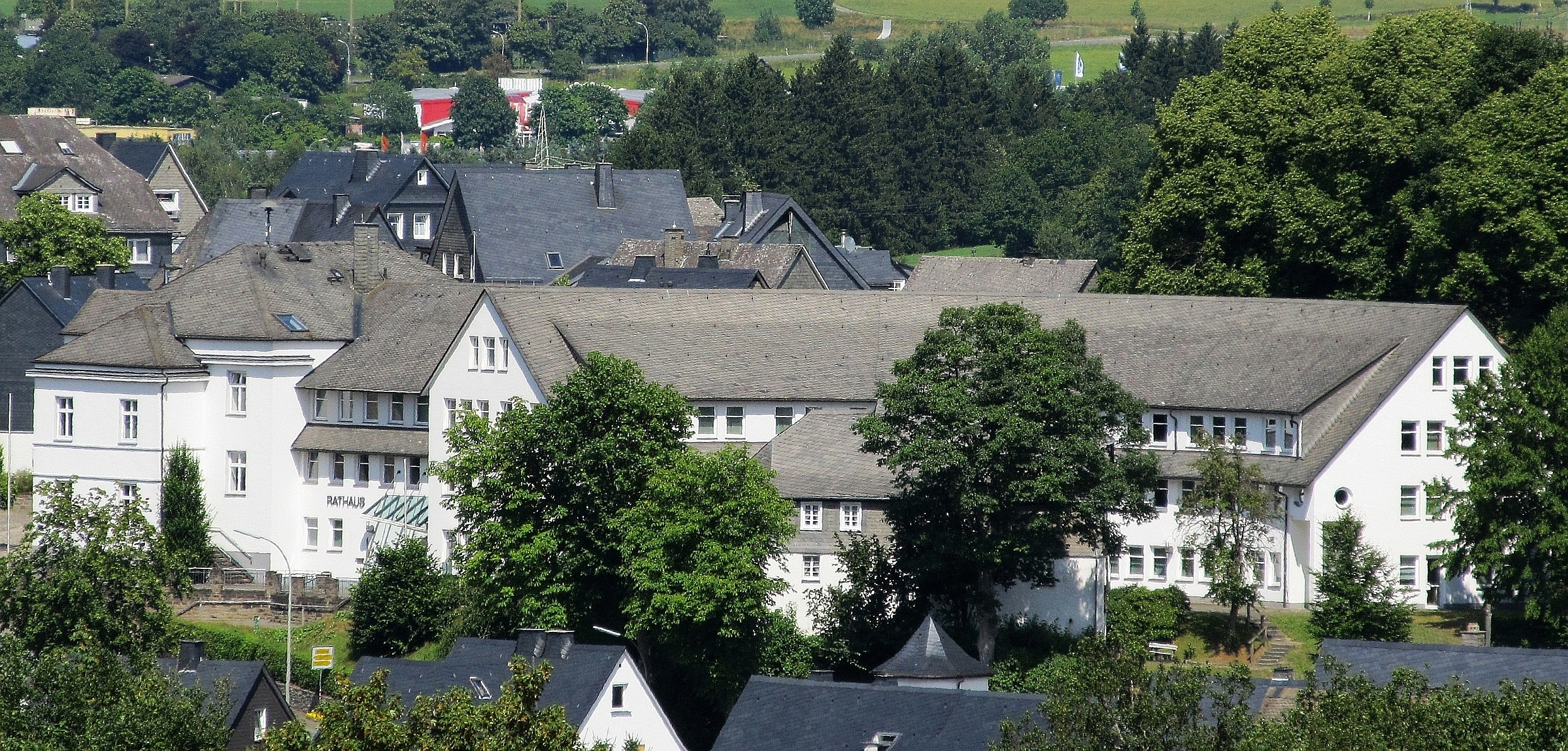 Rathaus in Schmallenberg (Germany)